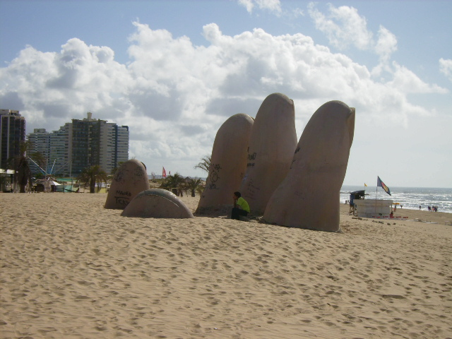 Symbol of Punta del Este, Maldonado, Uruguay.